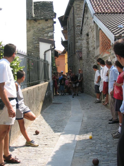 Il gioco tradizionale della furnera per le strade di Bureglio